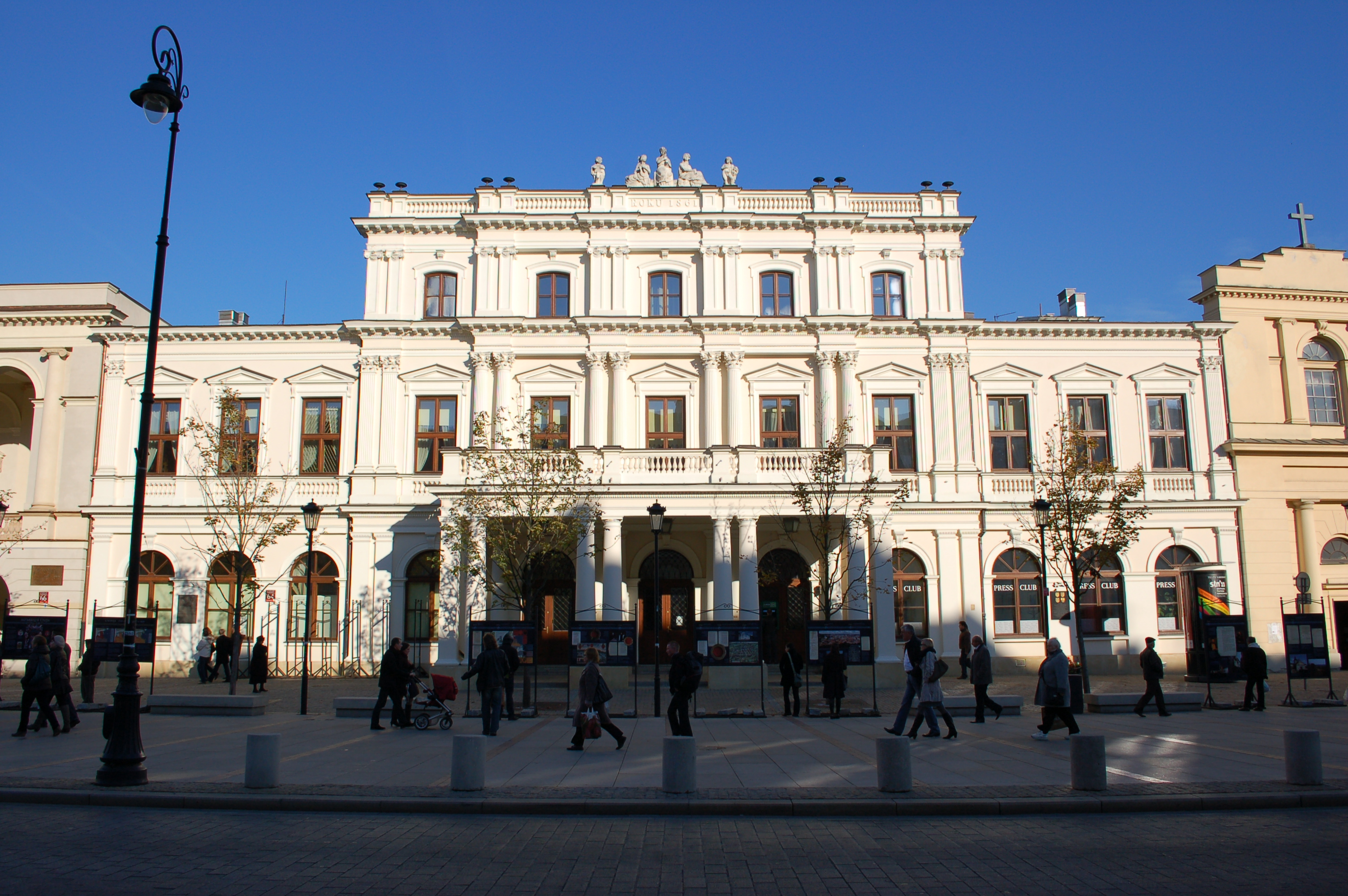 Krakowskie Przedmieście Warschau